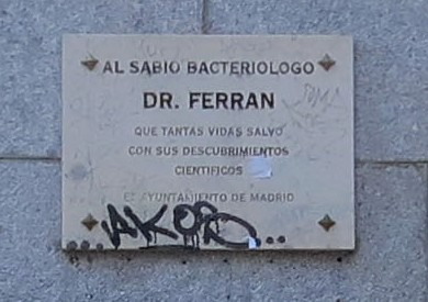 Monumento al doctor Ferrán en la plaza de Cristino Martos de Madrid